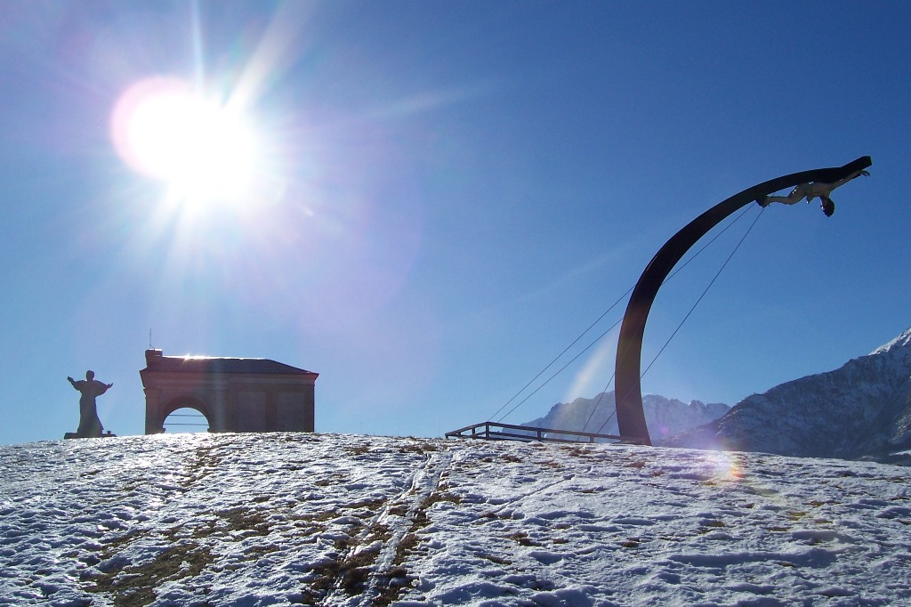 Cevo, dosso dell'Androla, Val Camonica, Italia